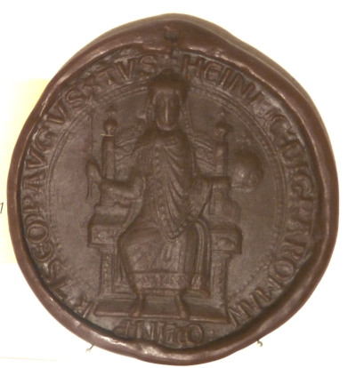 Pečeť JIndřicha VI.